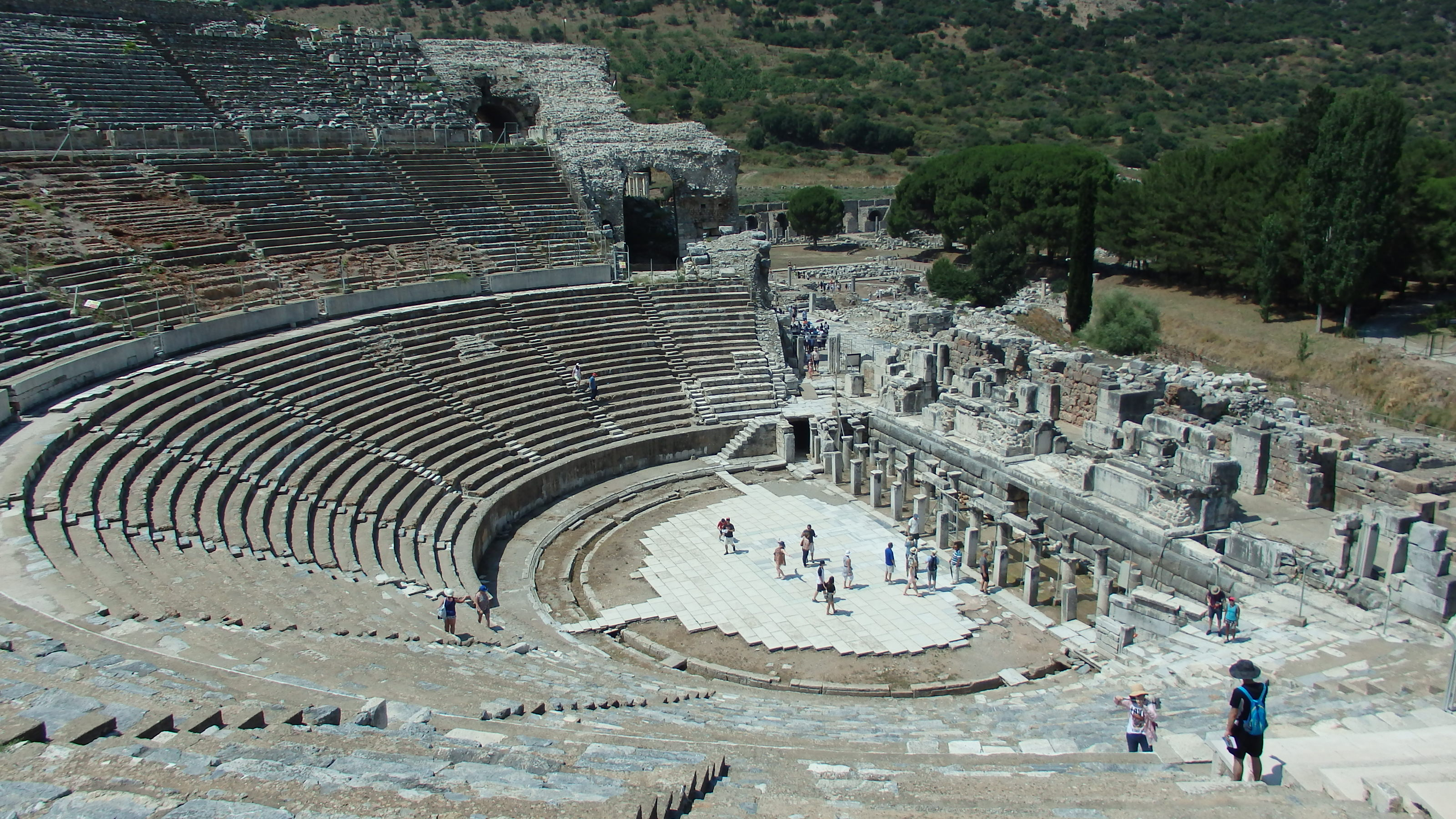 Efez - zabytki